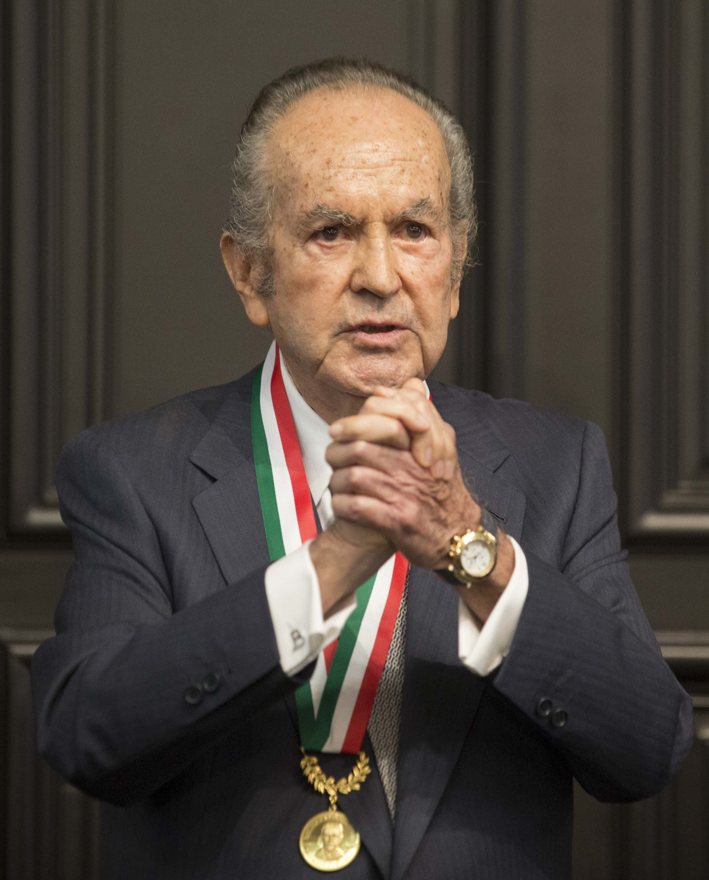 Alberto Baillères recibió la Medalla de Honor Belisario Domínguez 2015